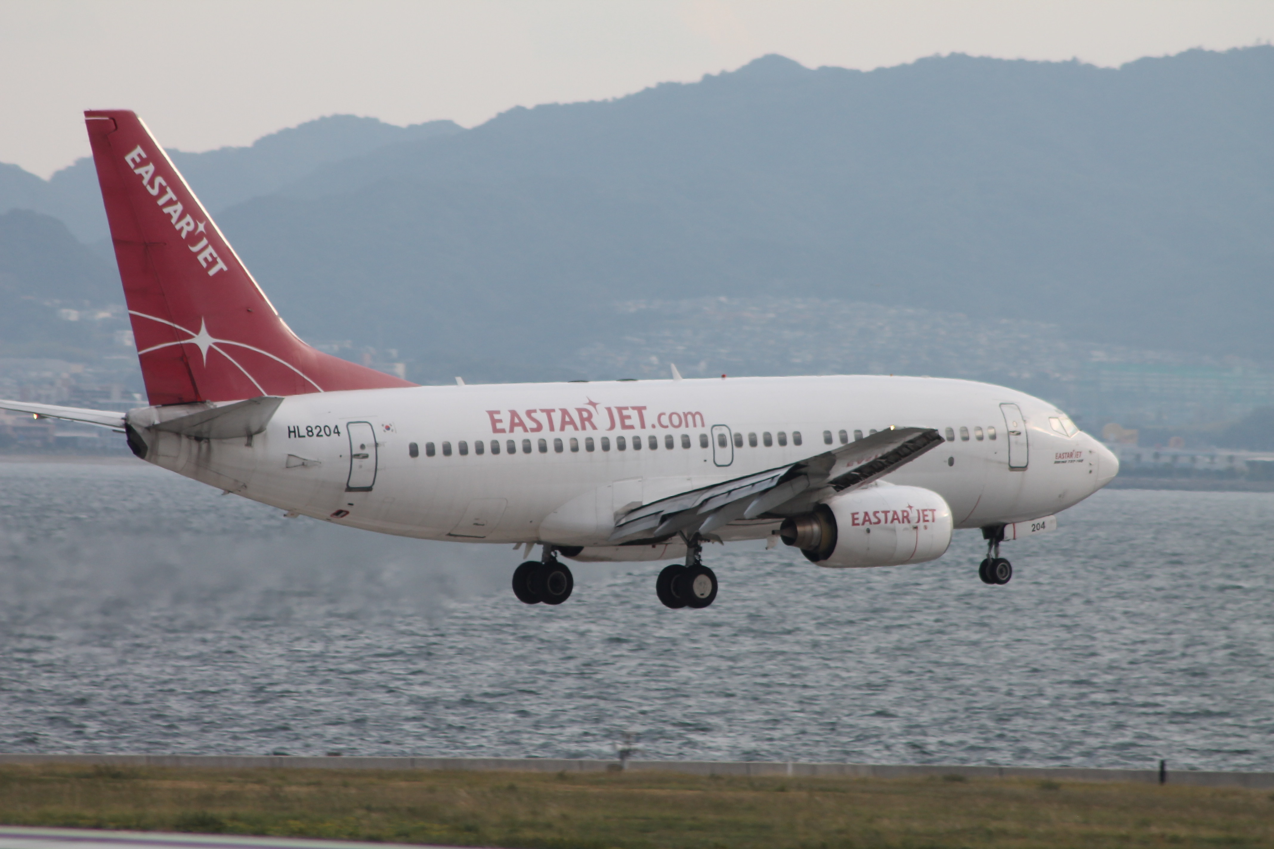 Osaka